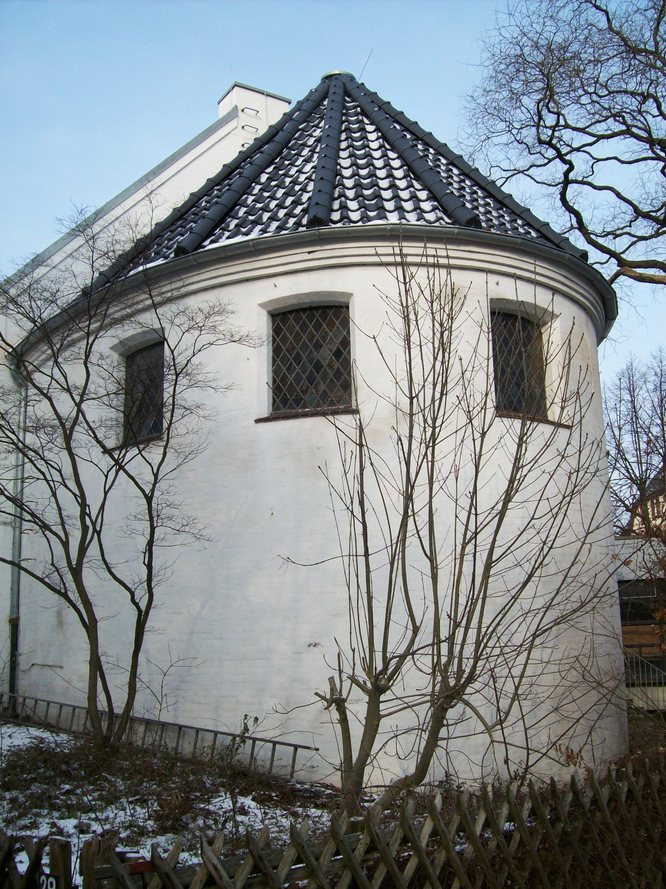 Hamburg-Eppendorf, Hamburg, Germany